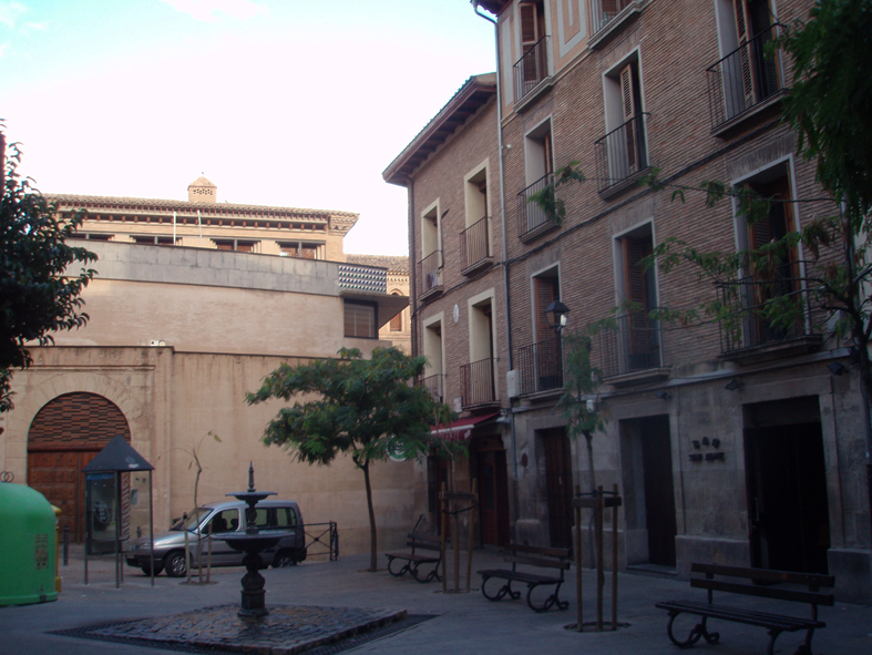 Plaza de San Jaime (Tudela), en 2010